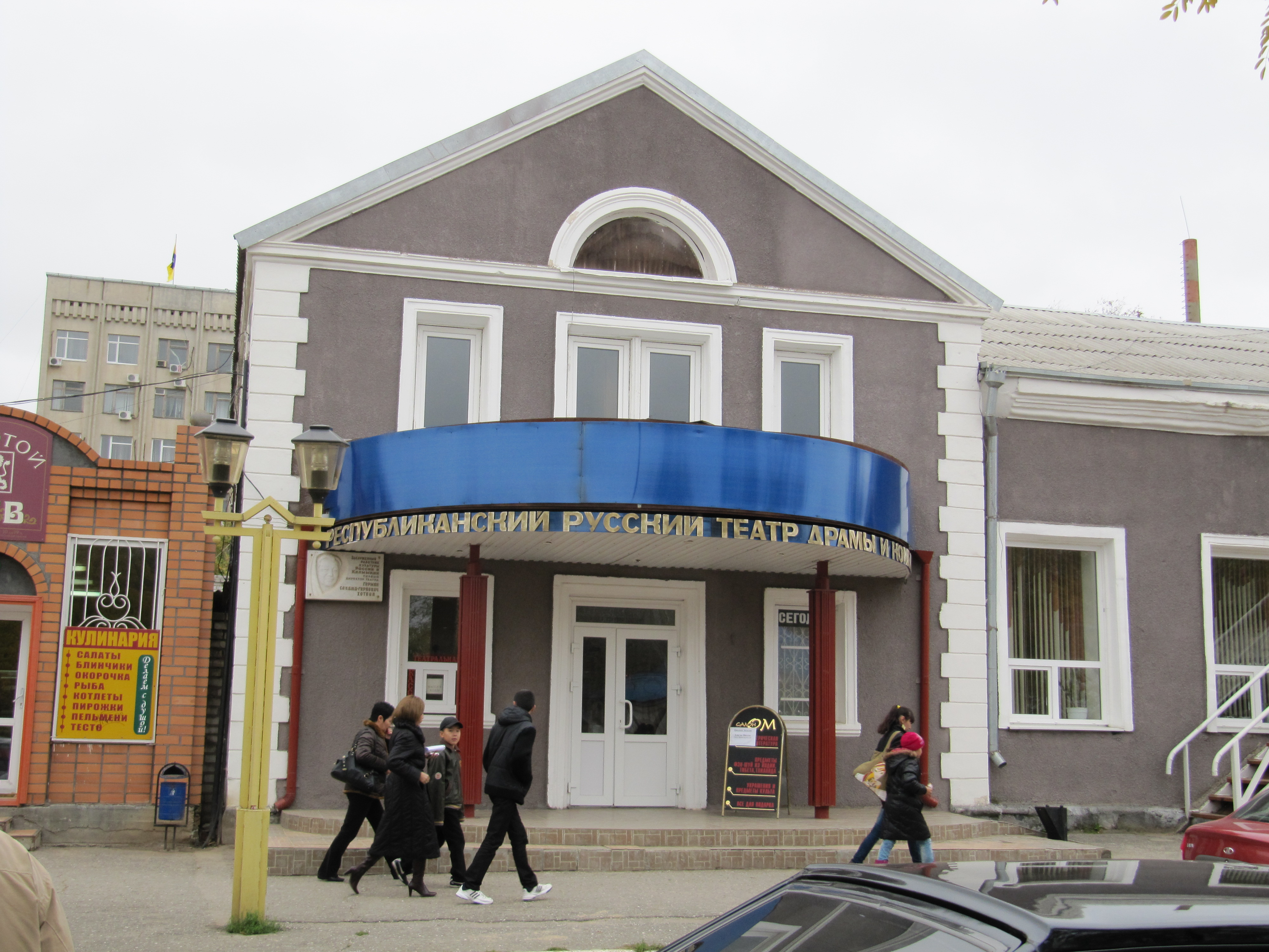 Русский театр драмы и комедии, Элиста, Калмыкия